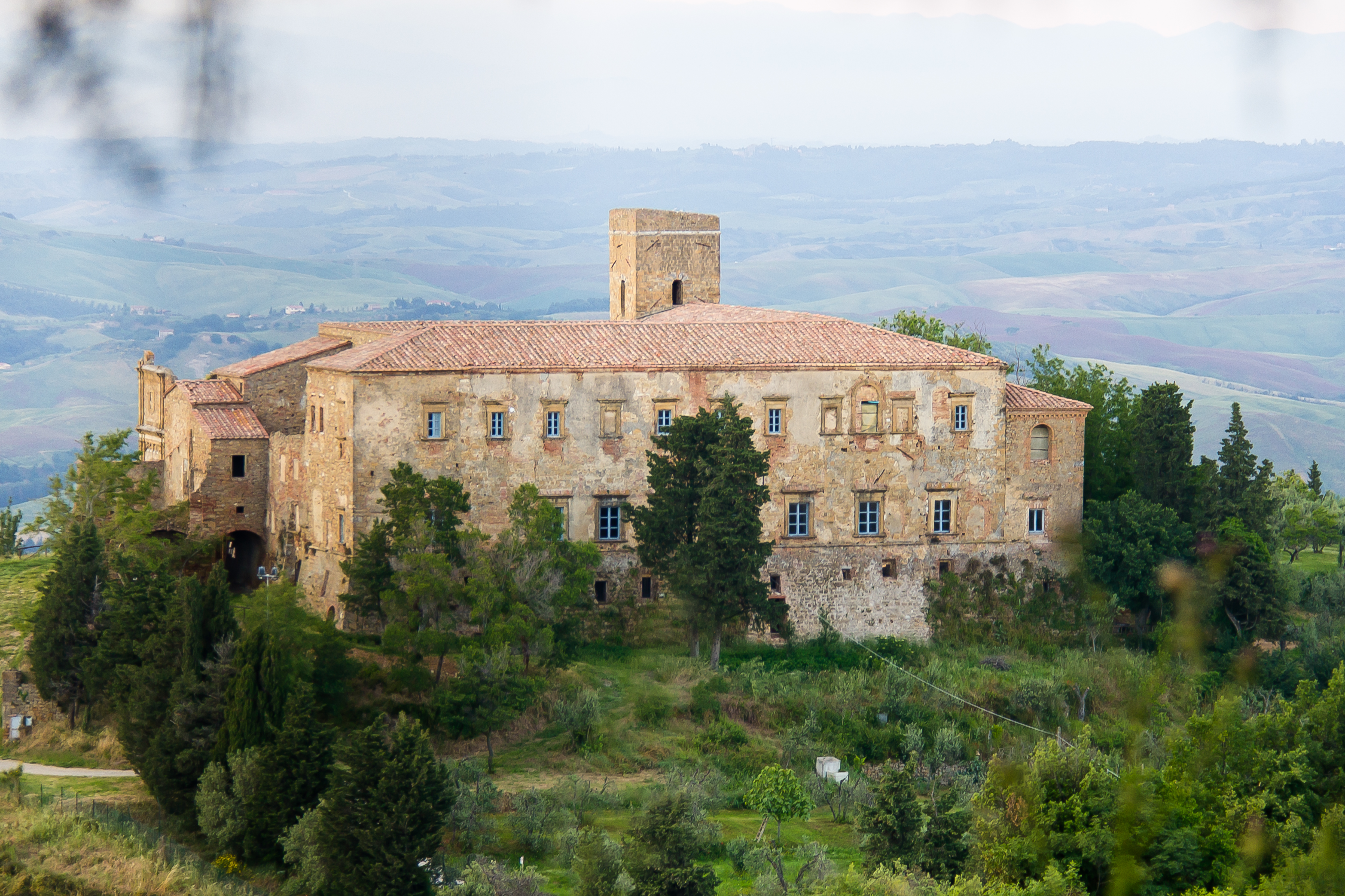 Abtei Santi Giusto e Clemente, Volterra, Toskana, Italien